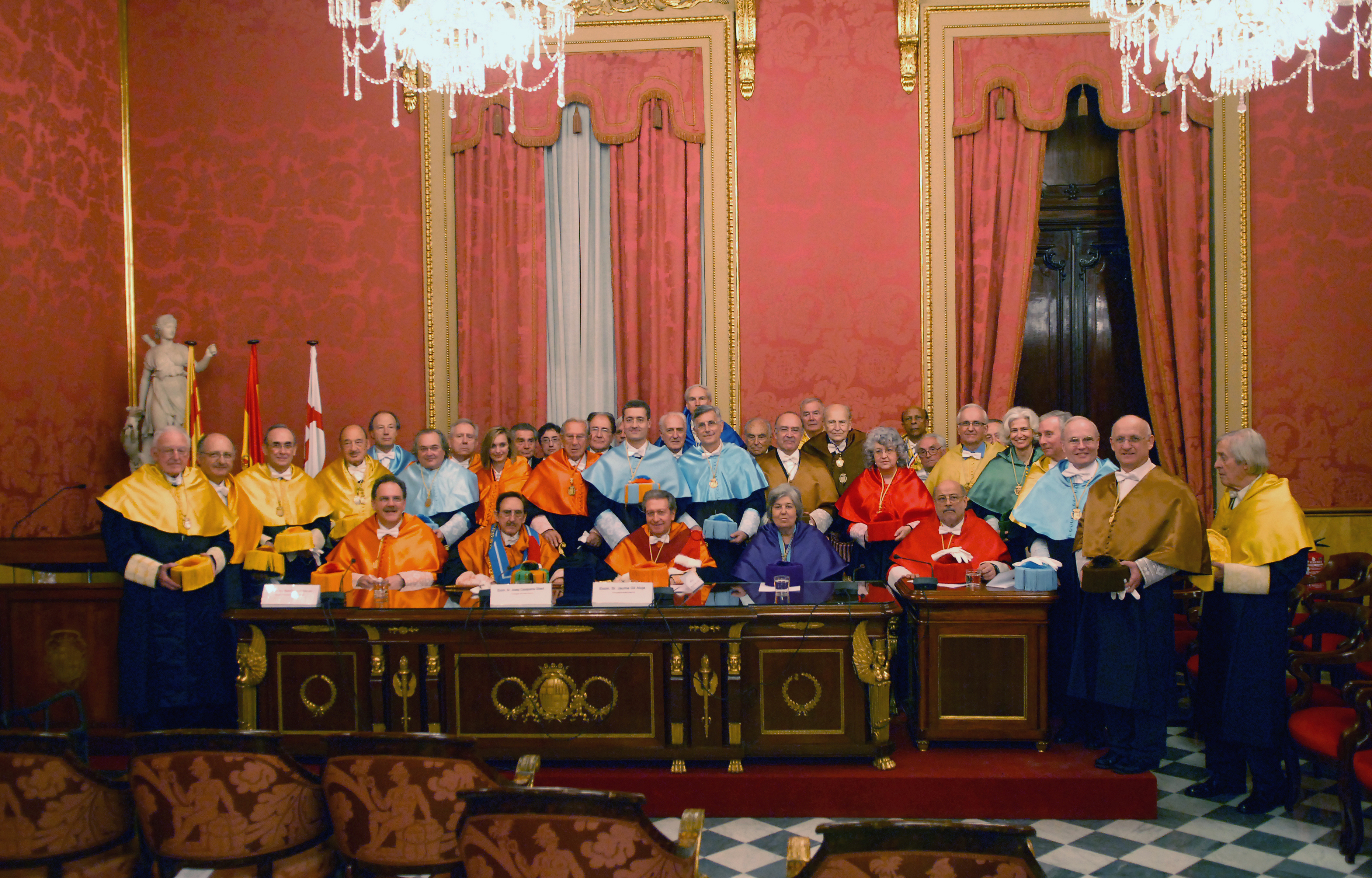 Ingreso del Dr Barquero en la RAD